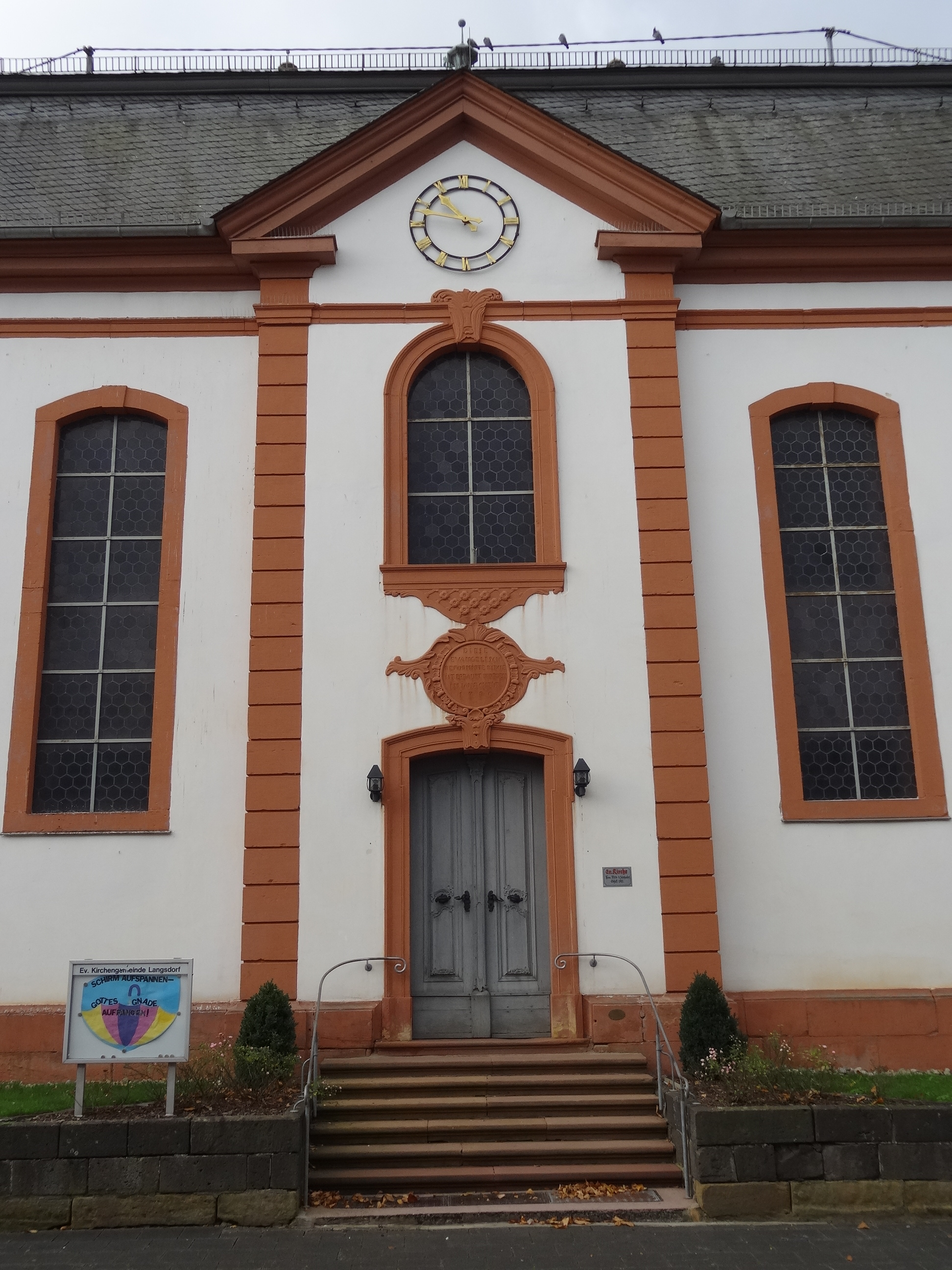 Evangelische Kirche Langsdorf (Lich)